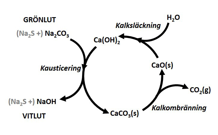 Kalkcykeln